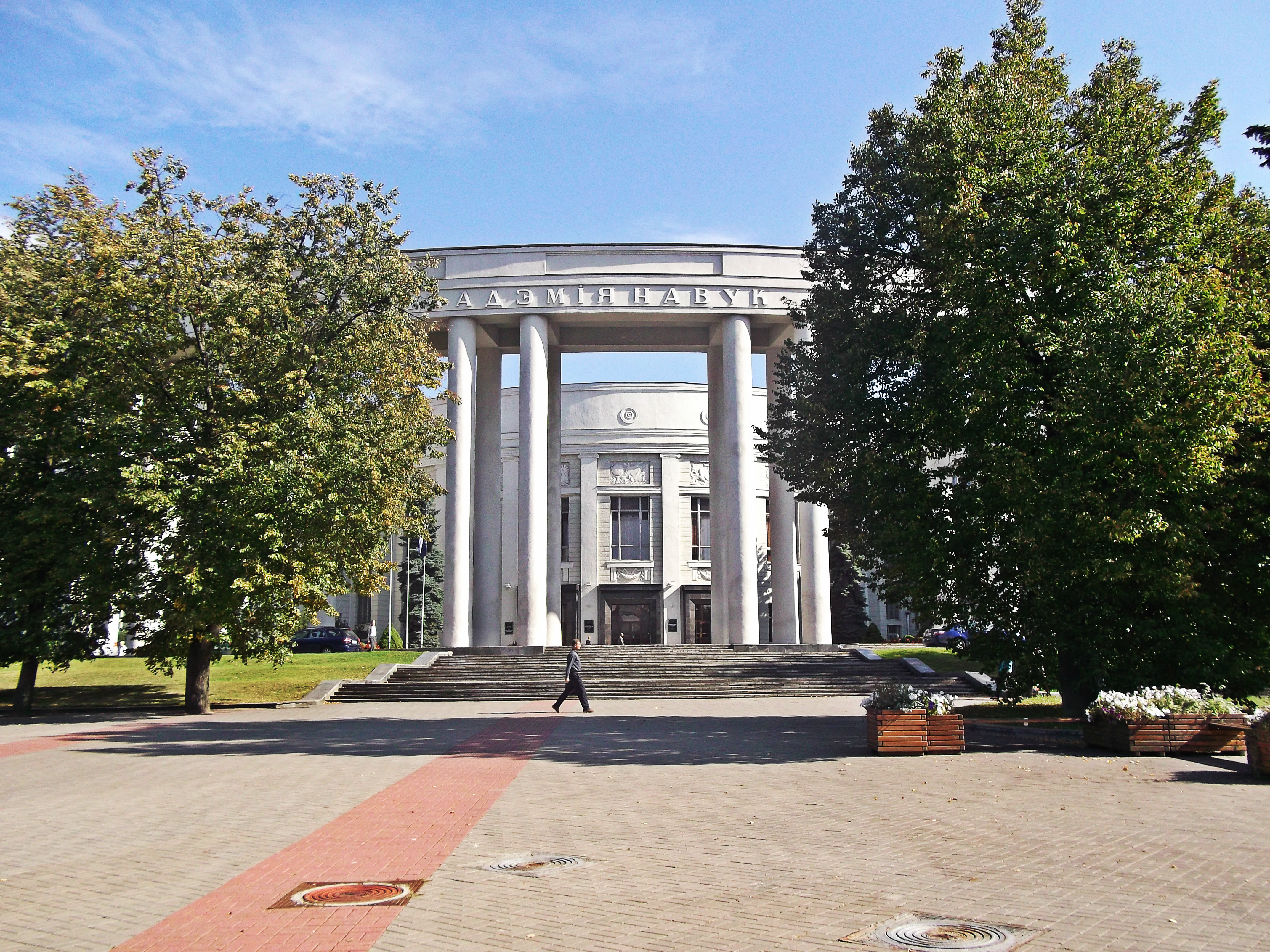 Беларуская (тарашкевіца): Будынак галоўнага корпуса Нацыянальнай акадэміі навук Беларусі. г. Менск This is a photo of Belarusian heritage monument. Reference number: 712Г000198 ( WLM)